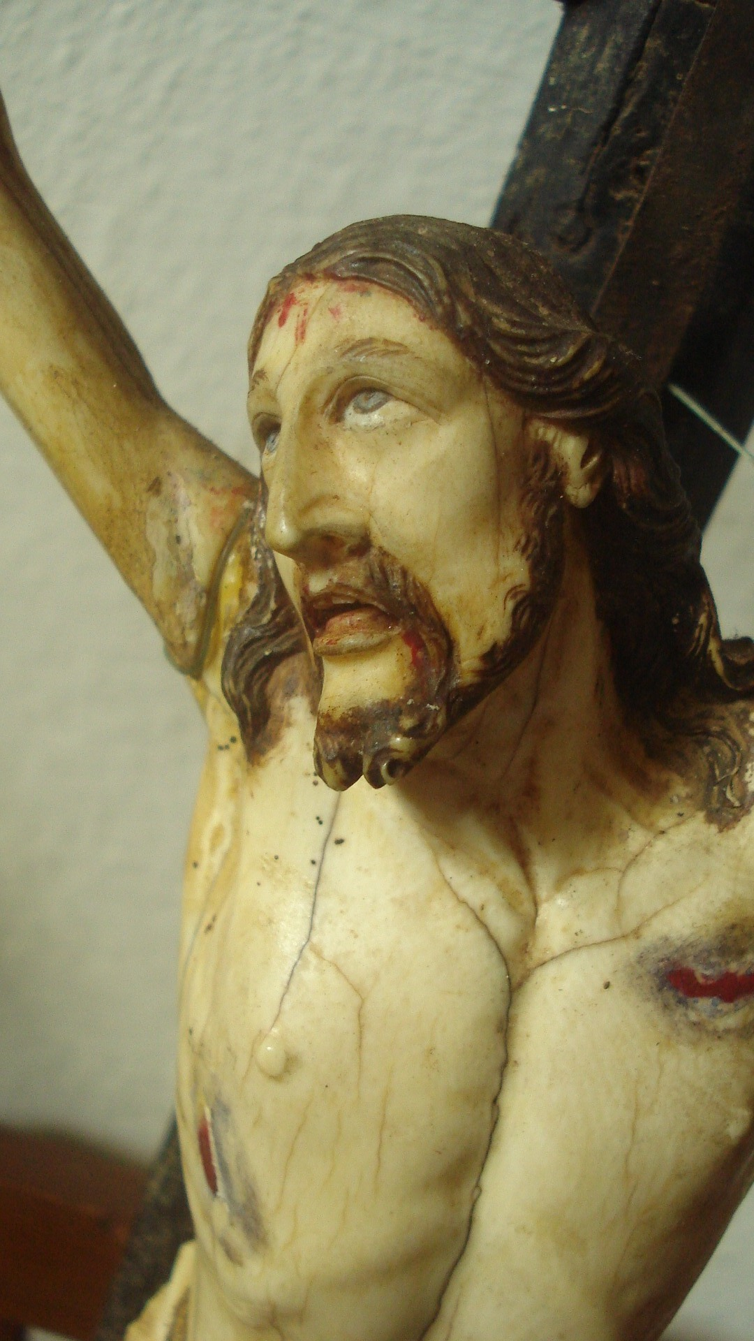 Crucifixo Barroco, roubado mas recuperado, feito de marfim.